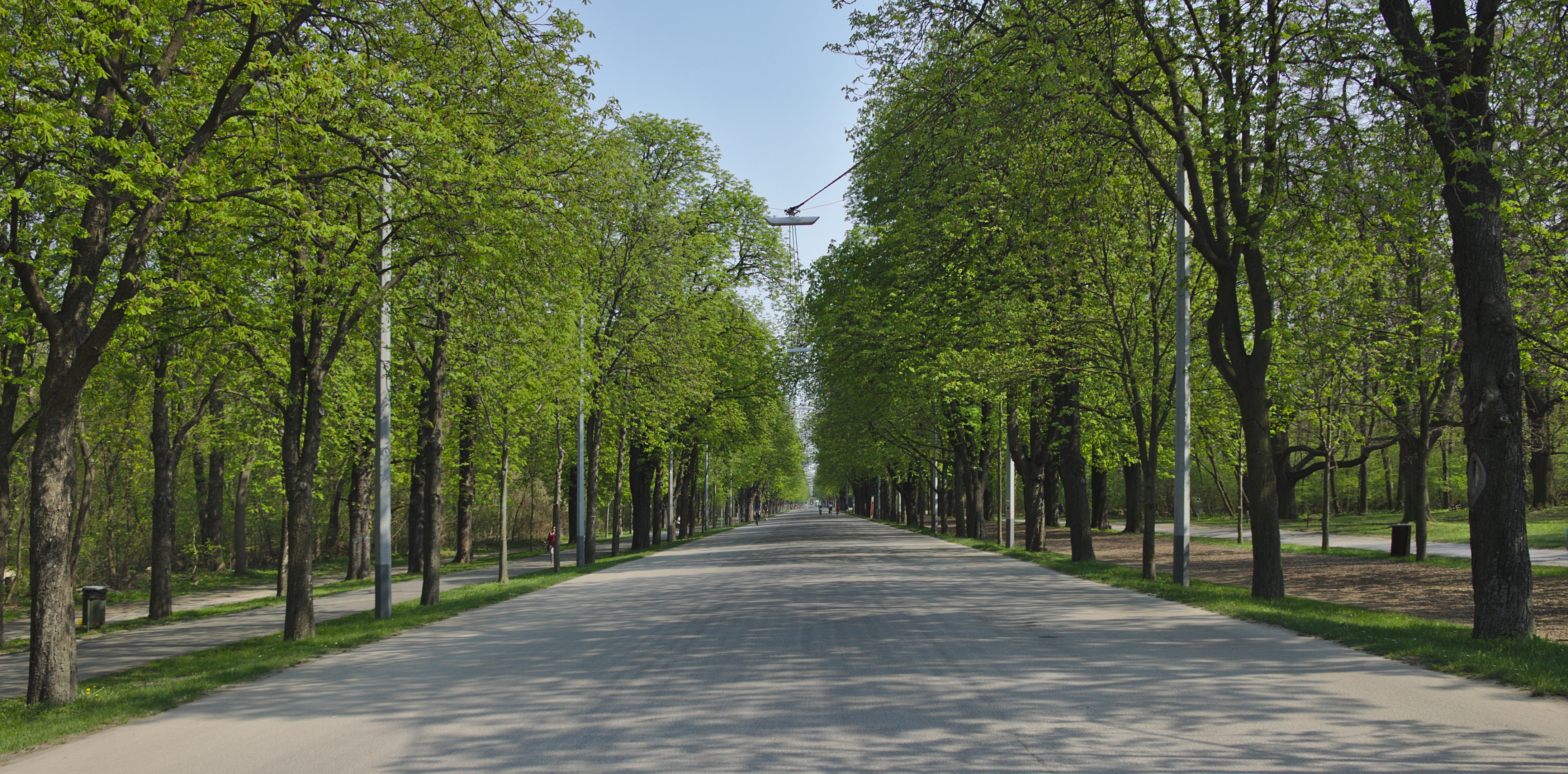 Hauptallee im Frühling